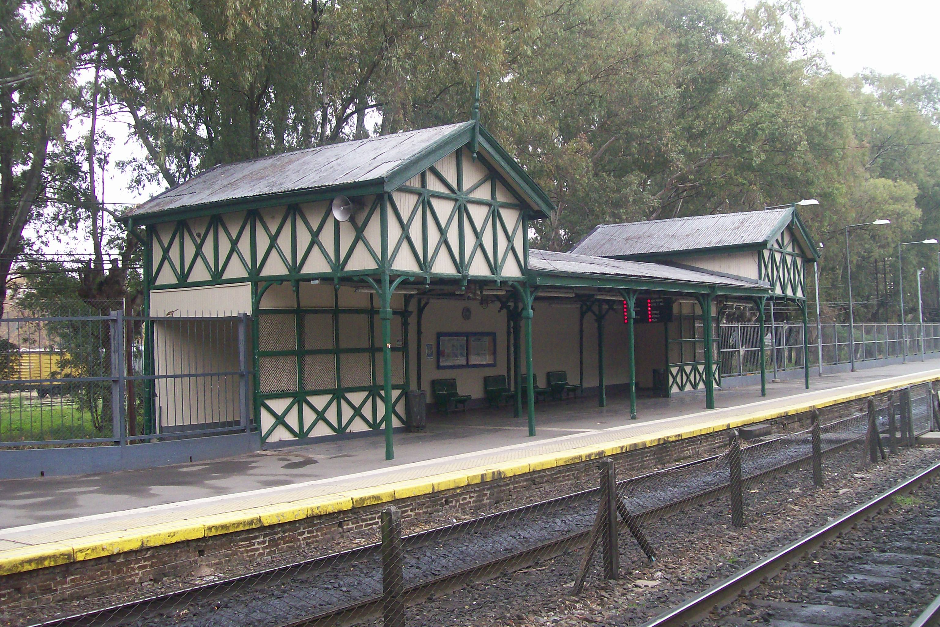 Estacion de Santos Lugares andén hacia José C. Paz